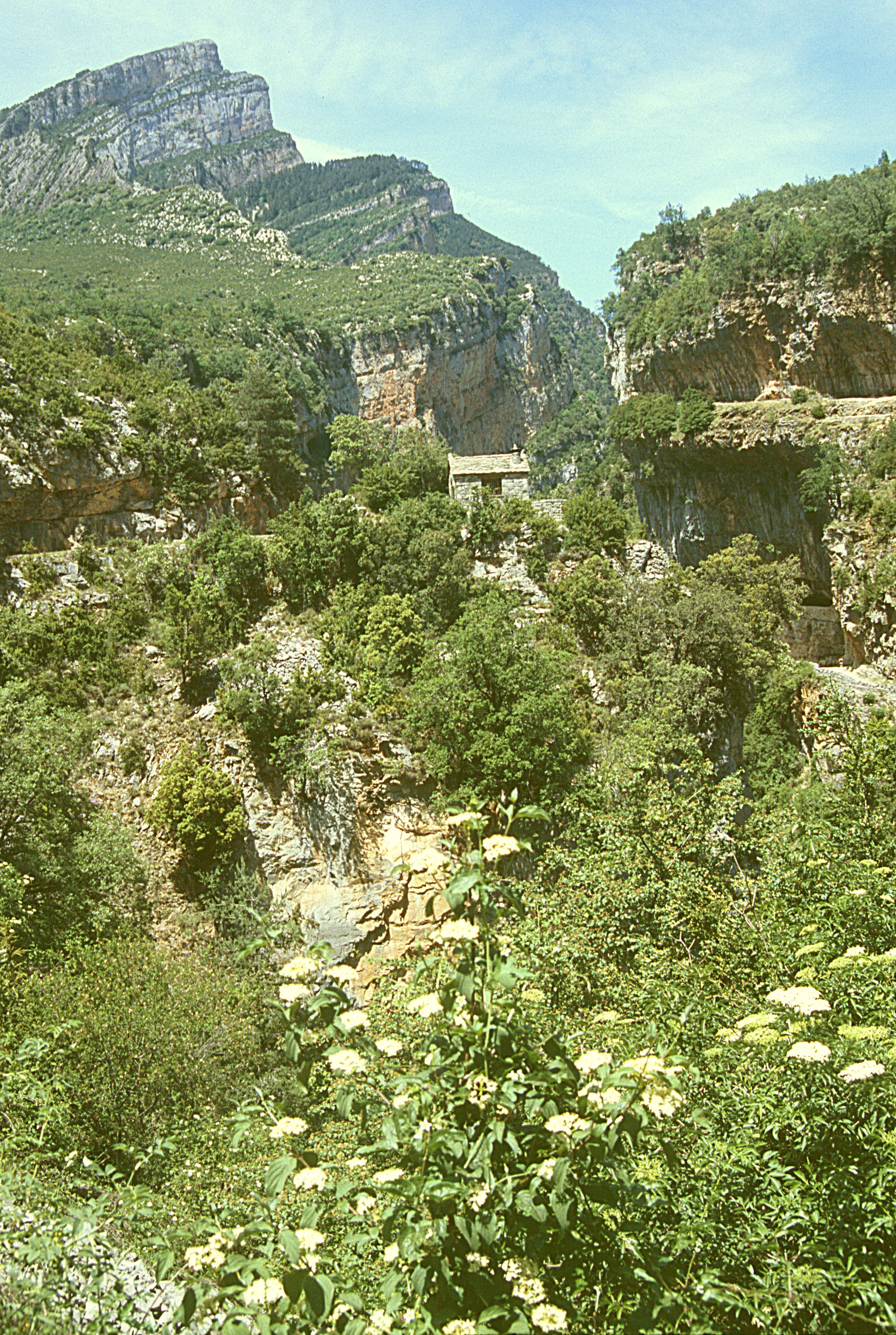 Cañon de Añisclo (Pyrenäen)